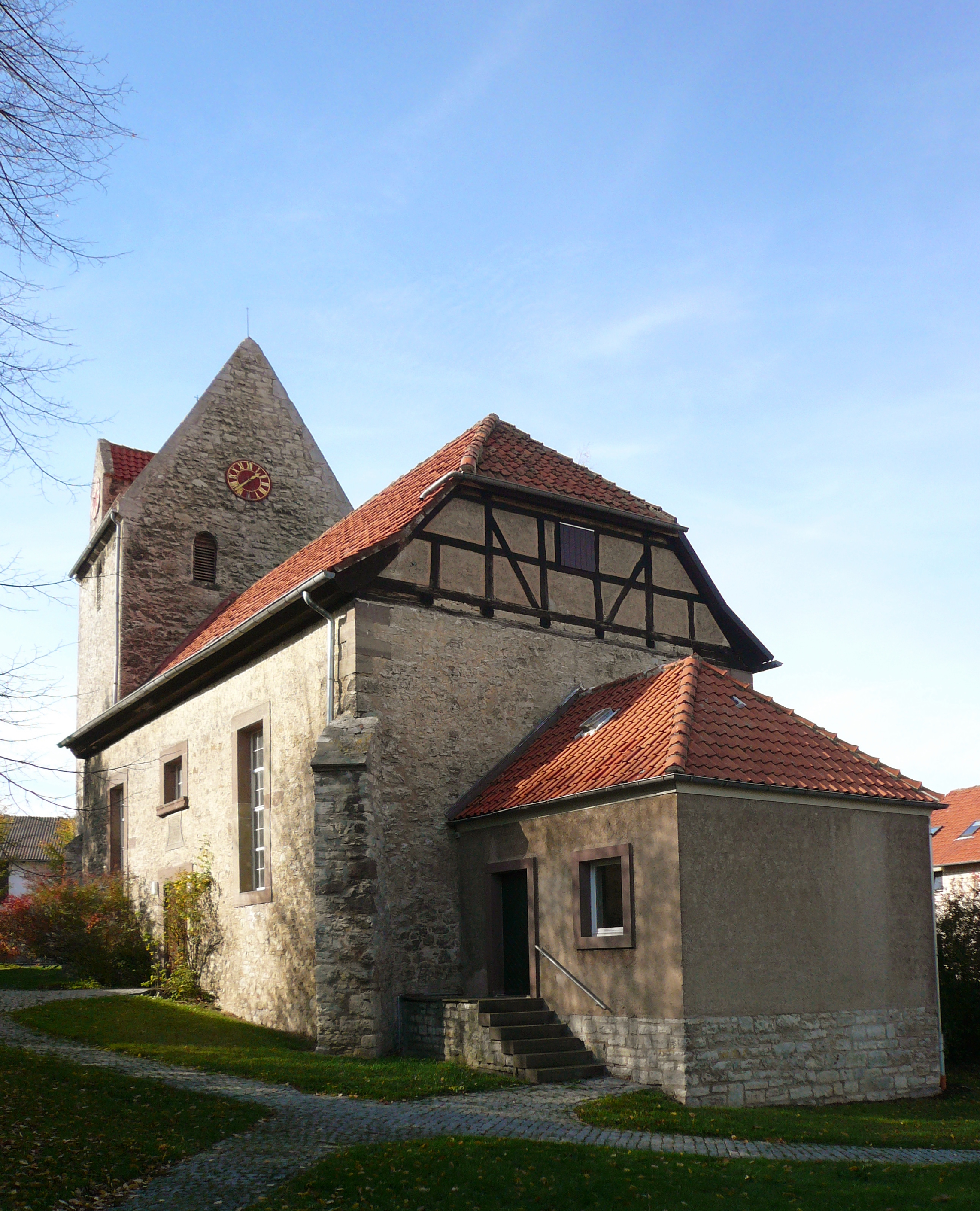 Ev.-luth. Kirche St. Marien in Hetjershausen, Stadt Göttingen, Niedersachsen. Ansicht von Südosten